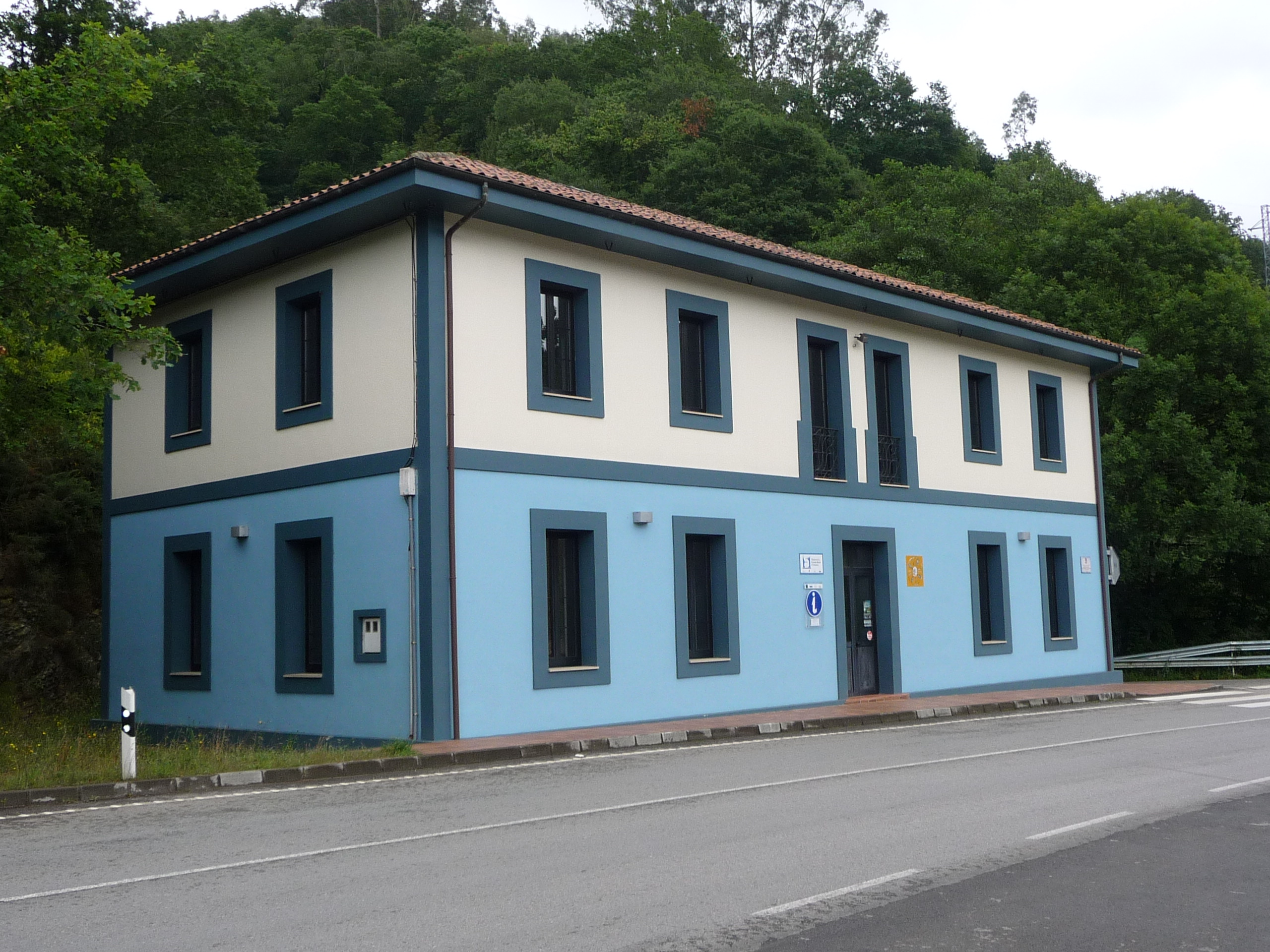 Muséu de la Escuela Rural d'Asturies